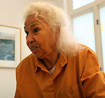 Nawal El Saadawi, Brussels, Belgium